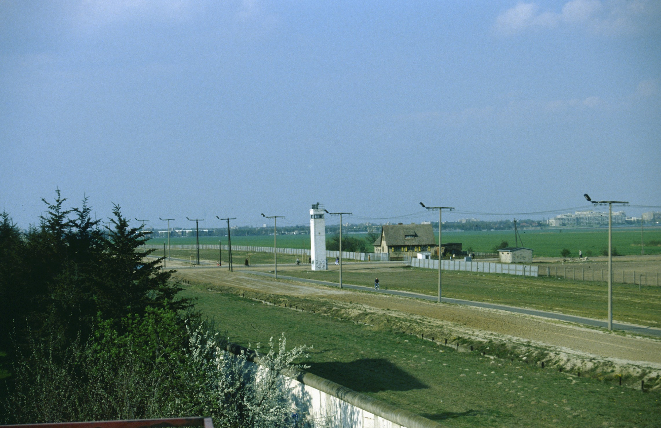 Grenzübergang Groß-Ziethener Straße Berlin-Lichtenrade / Großziethen mit Mauerstreifen und Wachturm